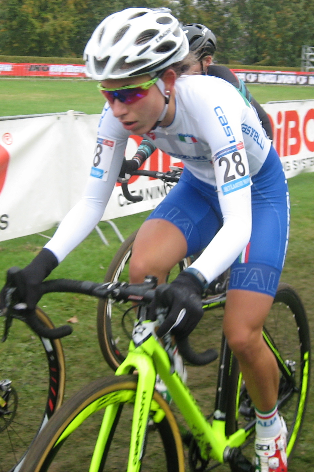 Alice Maria Arzuffi (9e) in de wereldbeker veldrijden op de Cauberg in Valkenburg, Nederland, op zondag 23 oktober 2016.